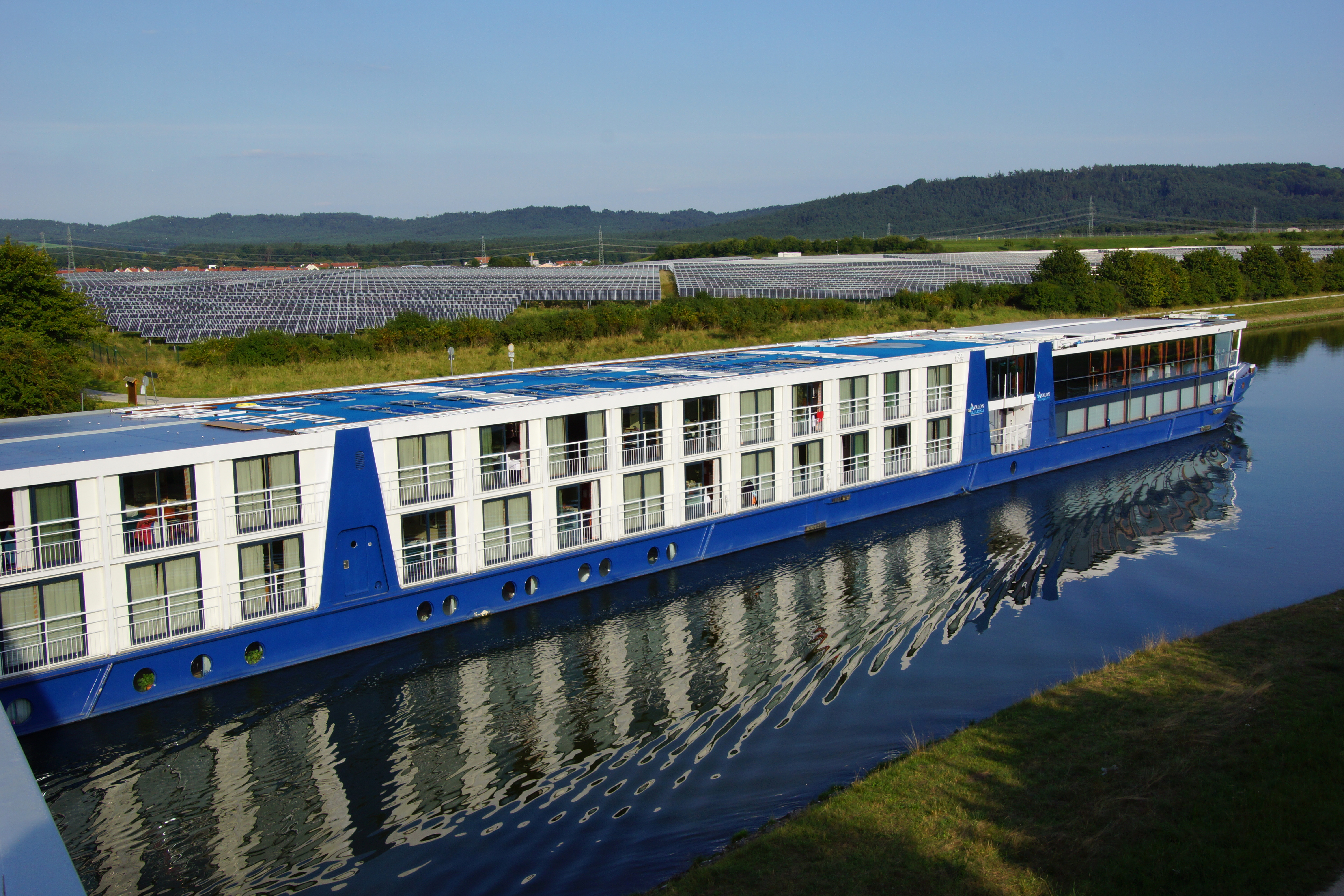 Der Mein-Donau-Kanal bei Bachhausen in der Oberpfalz: Das Flusskreuzfahrtschiff Avalon Tranquility""